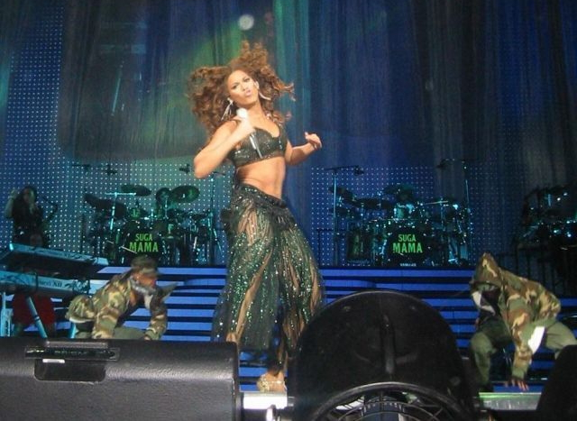 Beyoncé Knowles singing "Baby Boy"